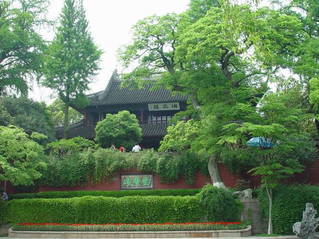 Jiaxing Nanhu Yanyulou